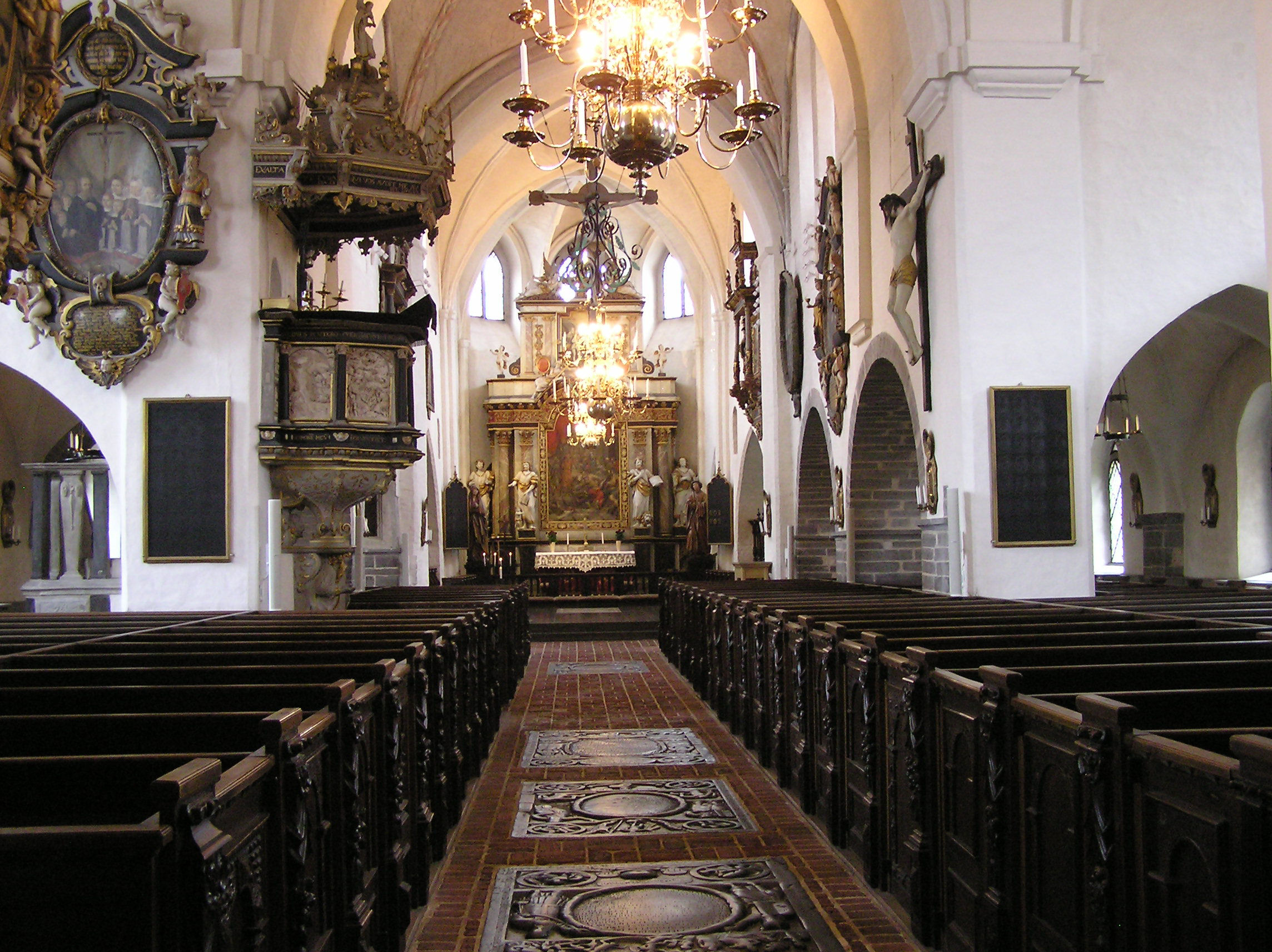 Sankt Maria Kirke,Ystad, Kirkerummet